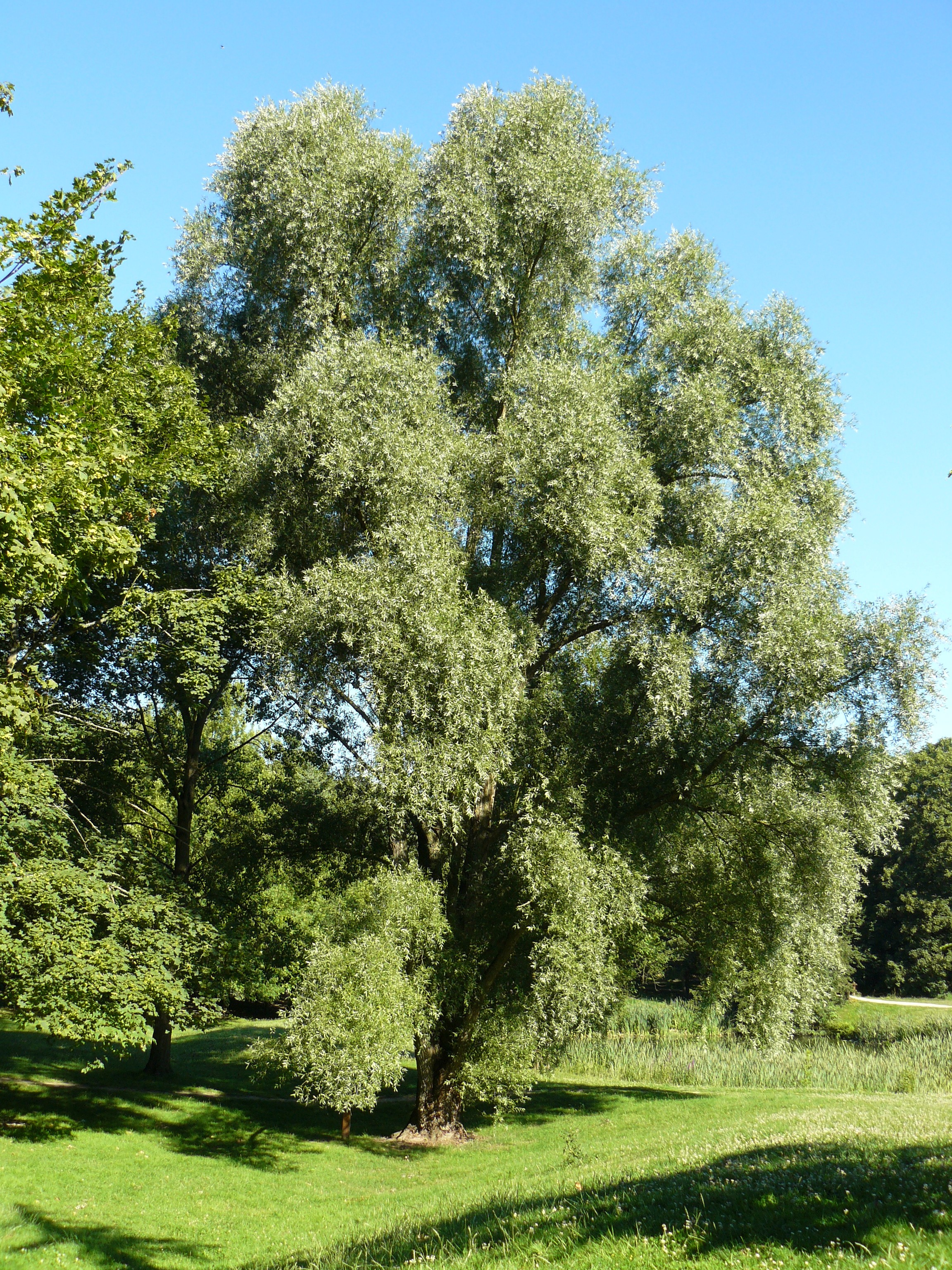 Saule osier (Salix alba)